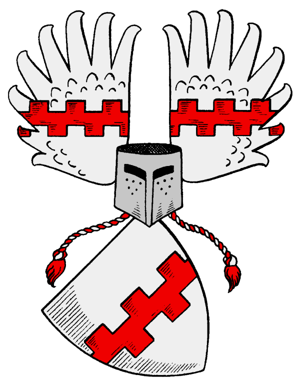 Wappen derer von Uslar-Gleichen